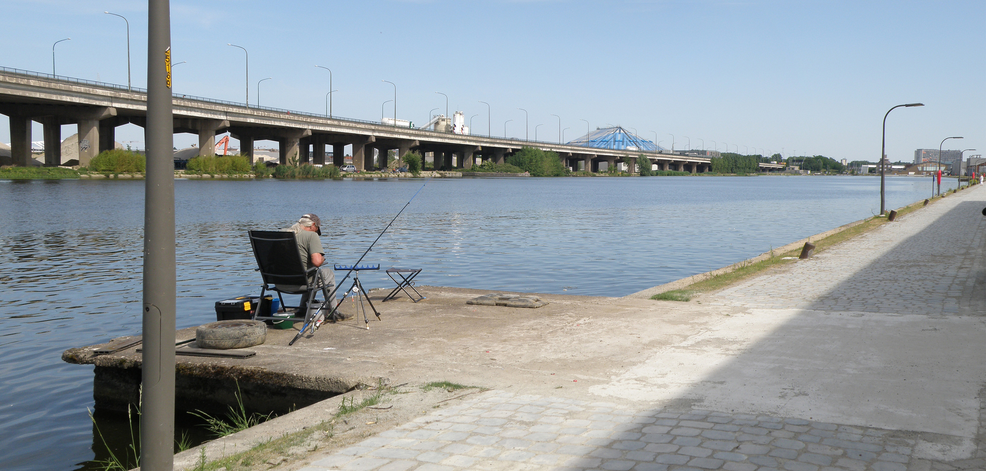 Antwerpen (België). Lobroekdok anno 2020.